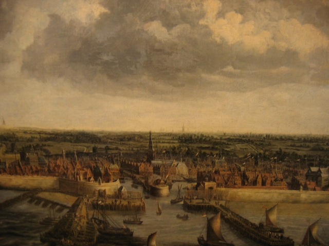 Zicht op Vlissingen vanuit zee door Petrus Segars, 1662. Foto en collectie: Zeeuws Maritiem muZEEum